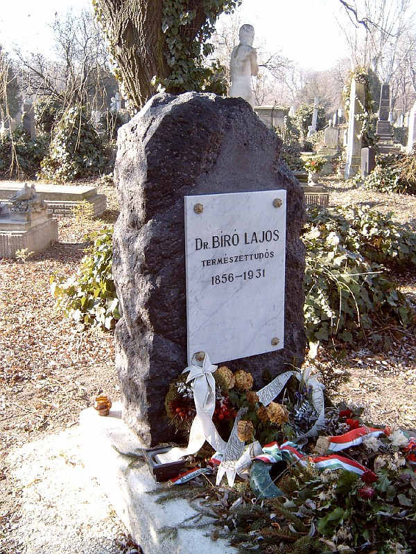 Bíró Lajos sírja Budapesten. Kerepesi temető: 34-1.